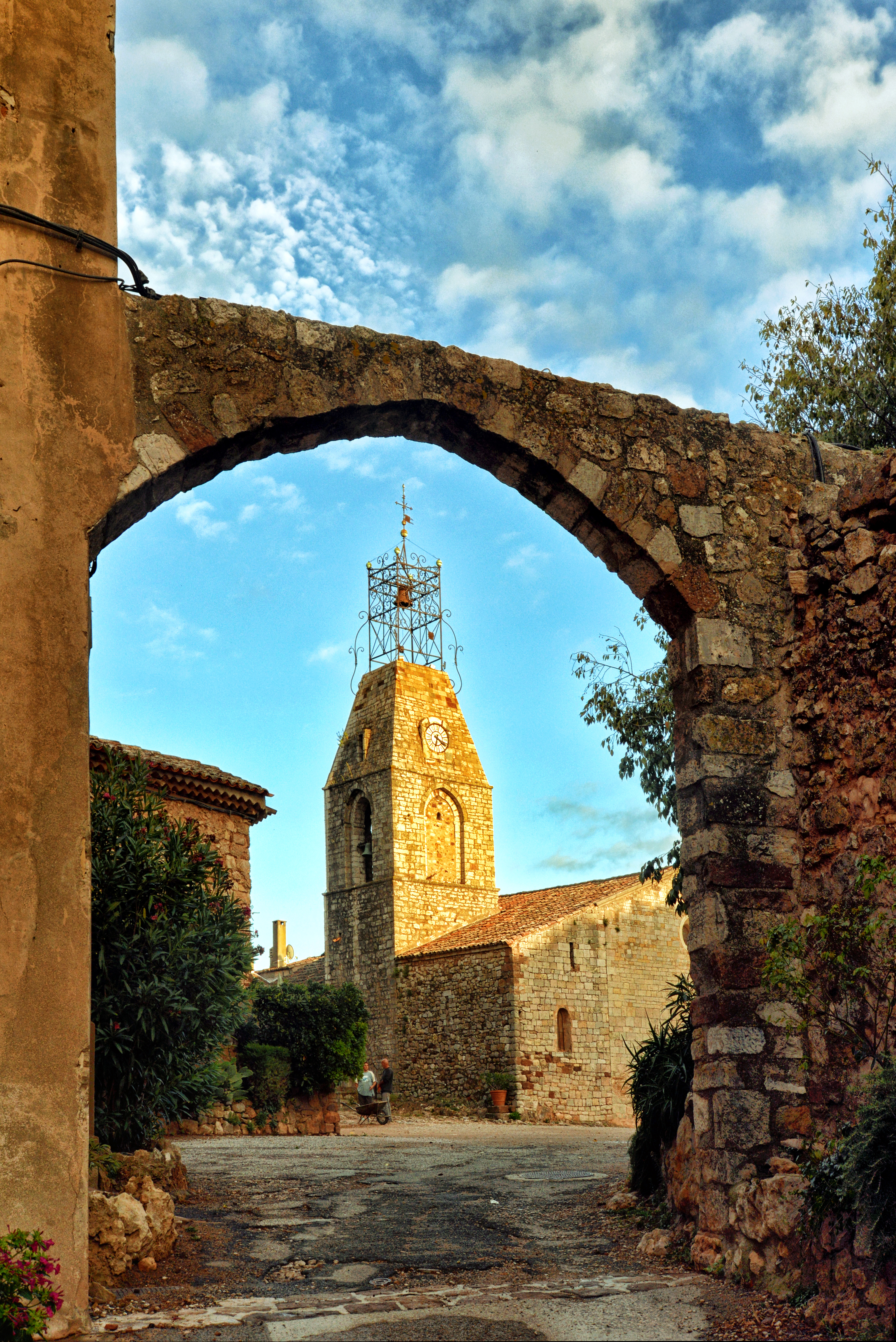 Le Cannet-des-Maures, Var (Provence) - Église du Vieux-Cannet, protégée depuis 1862